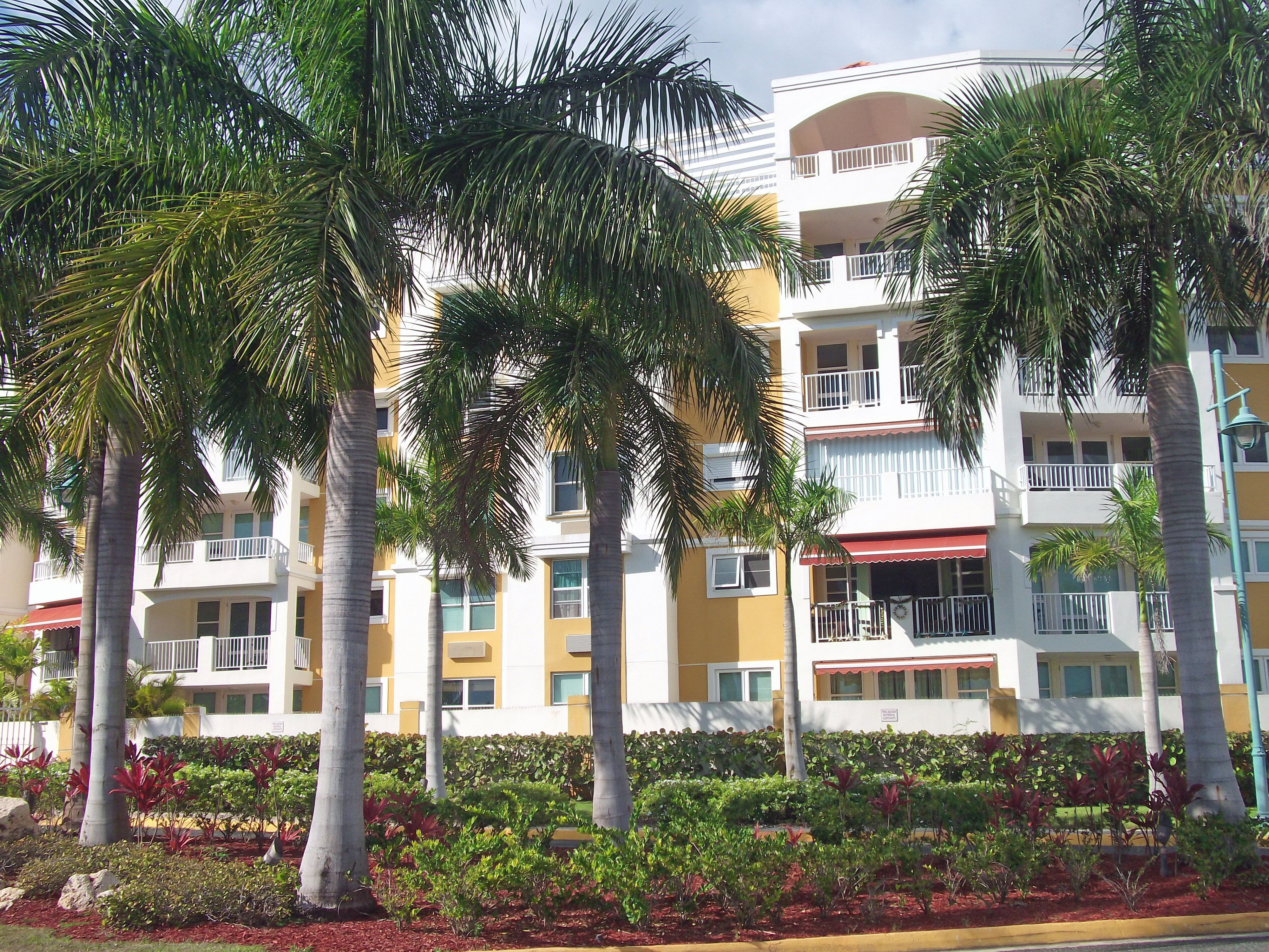 Avenída Atlántica - Zona Sur, Cabo Rojo, Puerto Rico